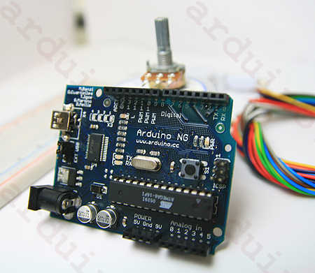 中文（台灣）: Arduino相關照片